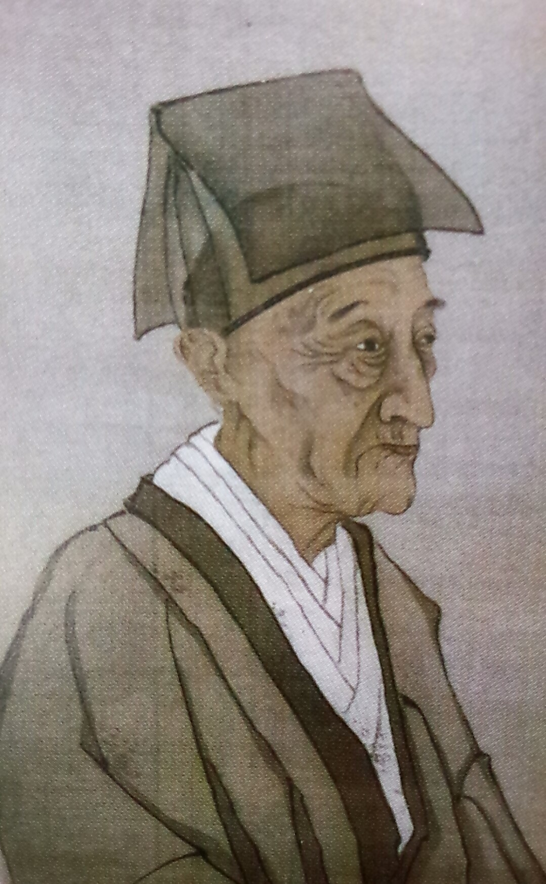 松平頼救の肖像。